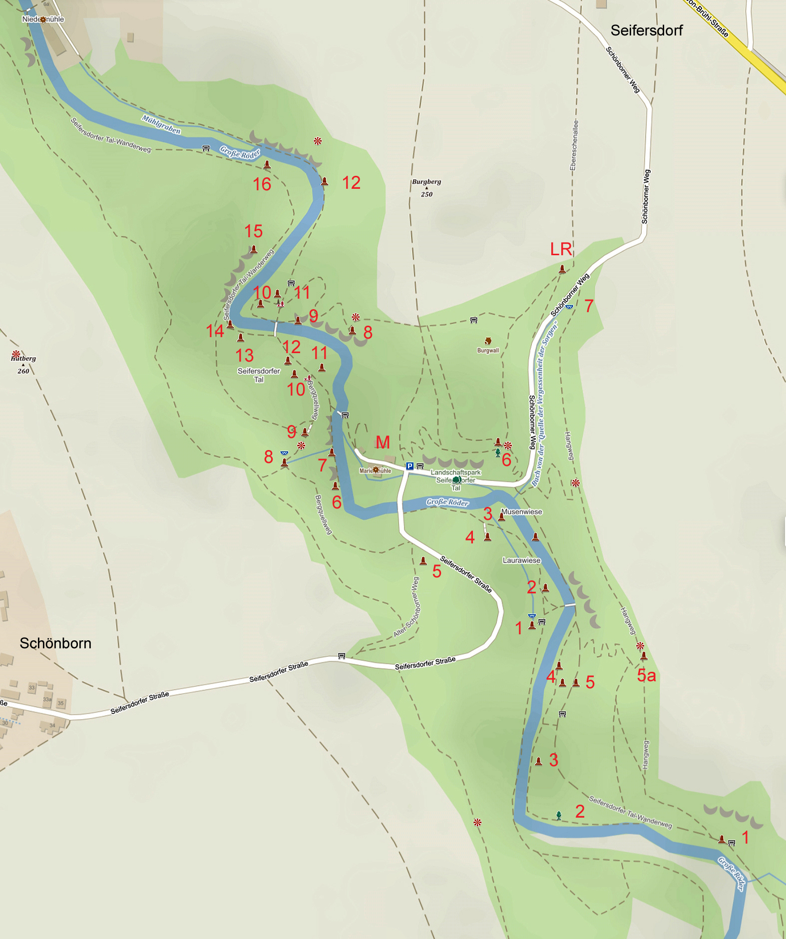 Karte mit Kulturdenkmalen im Seifersdorfer Tal bei Dresden. Denkmale am rechten Ufer: Altar der Tugend Linde der Ruhe Ruine der Vergänglichkeit (in Resten) Altar der Wahrheit (Postament mit ovaler Inschrifttafel) Lorenzos Grab und ehem. Lorenzos Hütte (5a) Hermannseiche (in Resten) Quelle der Vergessenheit der Sorgen Sonnenuntergangsbank, eine in Mauerwerk eingefasste Sandsteinplatte „Den freundlichen Pflegern des Tales“ Herder-Denkmal mit einer Eisenbüste auf einer Sandsteinsäule Denkmal für den Premierminister Graf Heinrich von Brühl (in Resten) Amor LR= Ludwig-Richter-Stein; M= Marienmühle Denkmale am linken Ufer: Petrarcas Hütte Lauras Denkmal (Säule) mit Lauras Brücke und Laurawiese mit ehem. Tempel der Musen (2a) Denkmal Leopold von Braunschweig (auf der Musenwiese) Denkmal Anna Amalia von Sachsen-Weimar und Eisenach Obelisk Steinvase „Der gotische Freundschaft“ Bergquelle („Schöpfe schweigend“) Denkmal des Vaters der Gräfin (Amphore mit Schlange) Hütte des Pythagoras Denkmal des jungen Grafen Carl von Brühl Gedenkstein Moritz Säule Dem Sänger des Tales Ehem. Hütte der Alpenhirtin Ehem. Bad Stein: „Ach wie schön“ Bildsäule des Pan (verschollen)